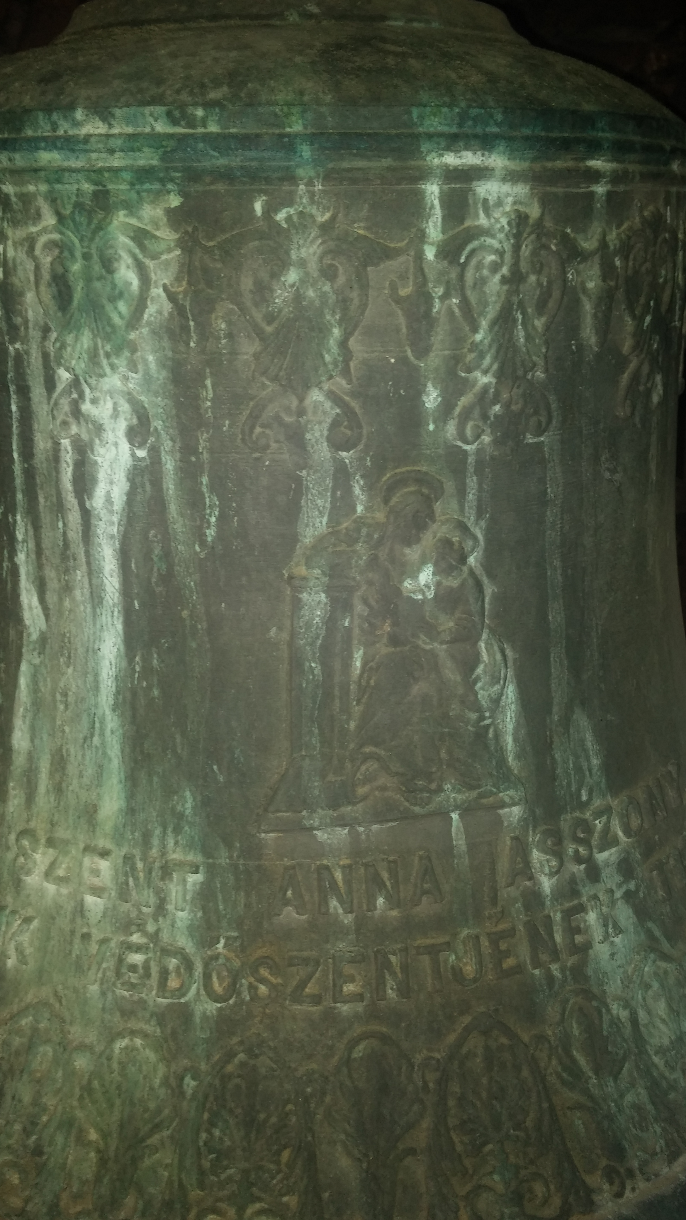 A 2016-os nagy torony felújításkor készült a fotó a harangról.